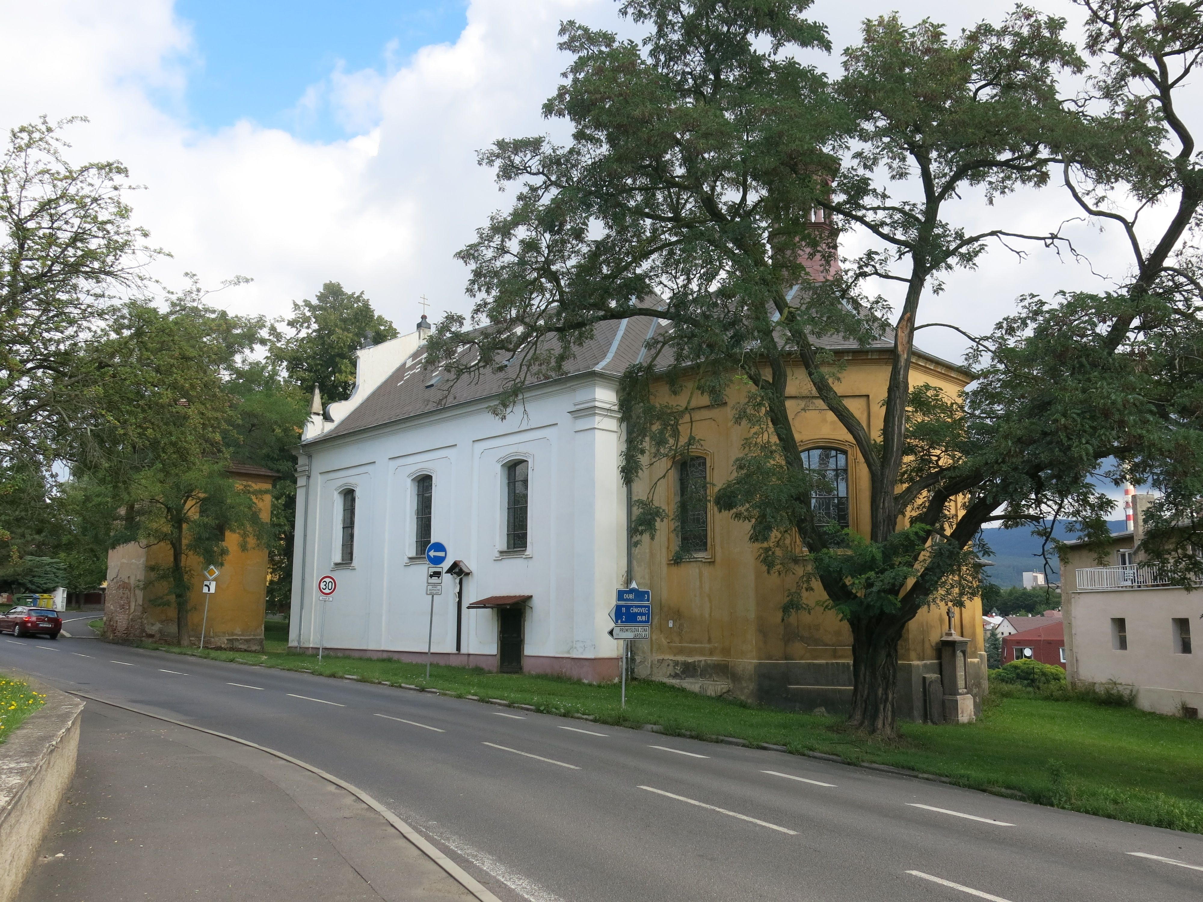 Kostel svatého Valentina, Novosedlice.